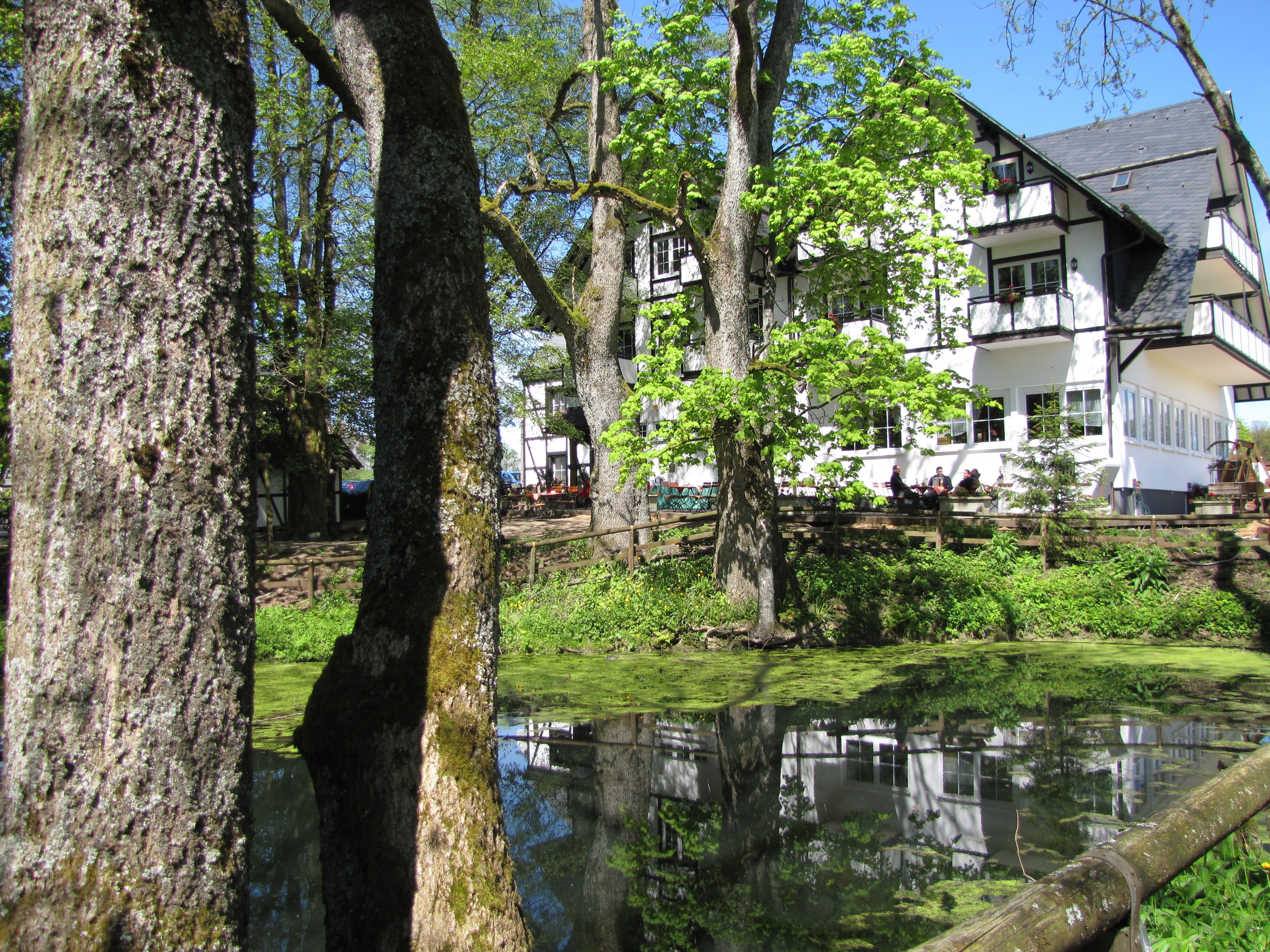 Quellteich der Lahn am Lahnhof auf dem Lahnkopf